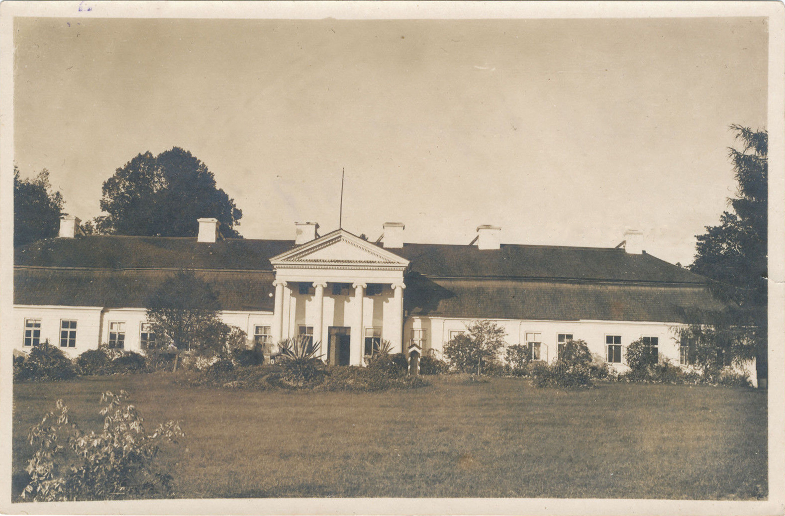 Беларуская (тарашкевіца): Магілёўцы (Mahiloŭcy), сядзіба Быхаўцаў (Bychaviec)